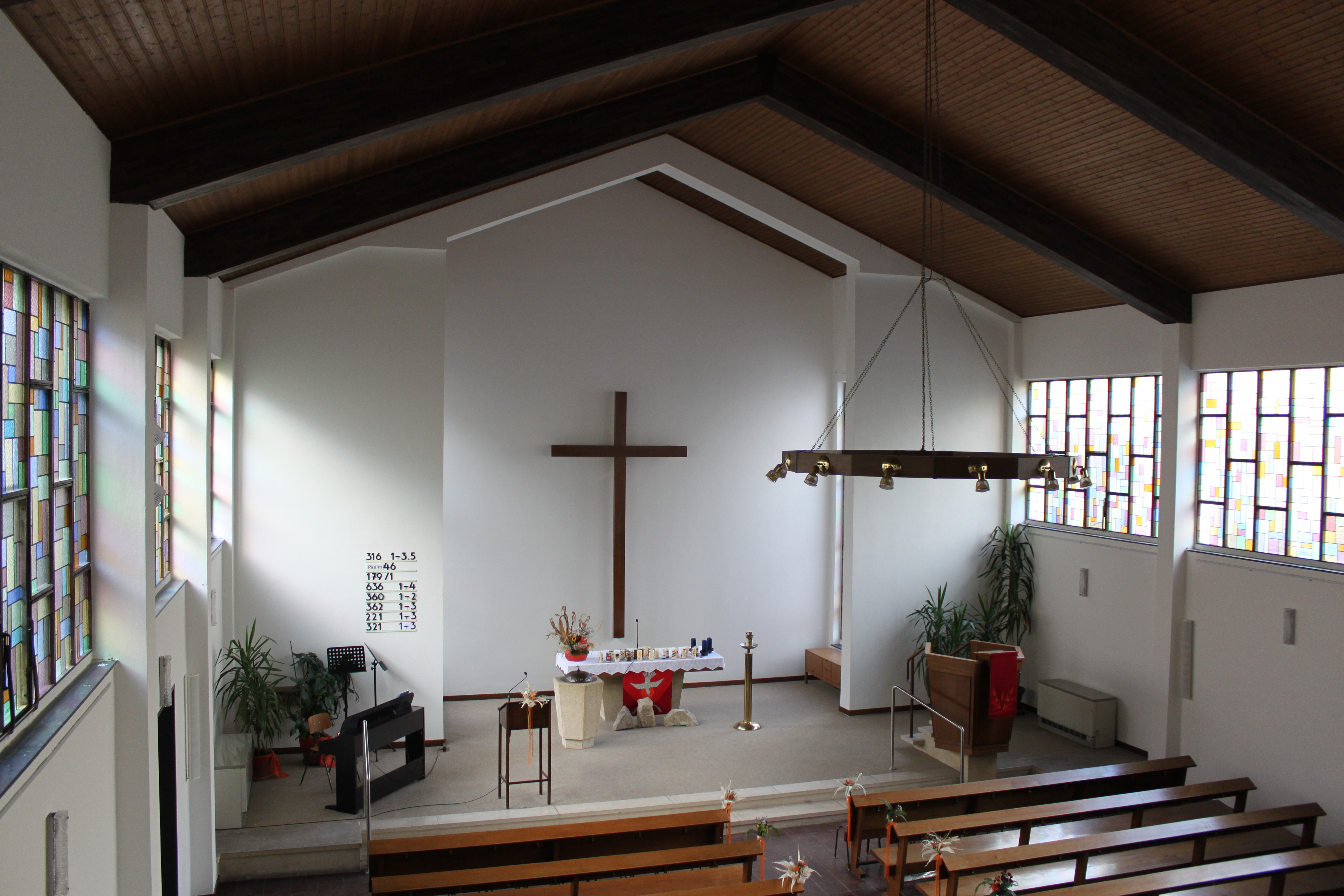 Die evangelische Markuskirche in Wien Ottakring nach dem Umbau im Jahr 2012